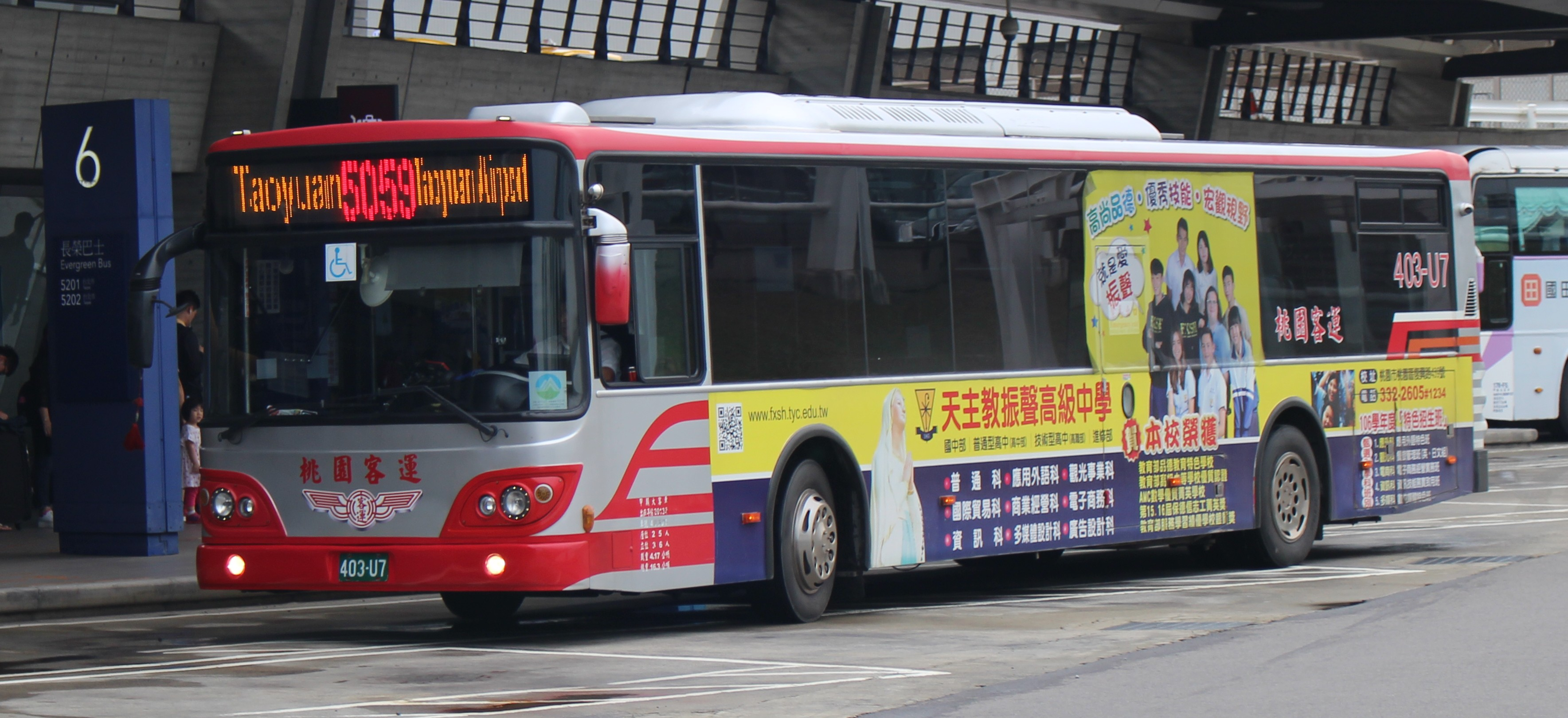 桃園客運 2013 DAEWOO BS120CN 403-U7 5059